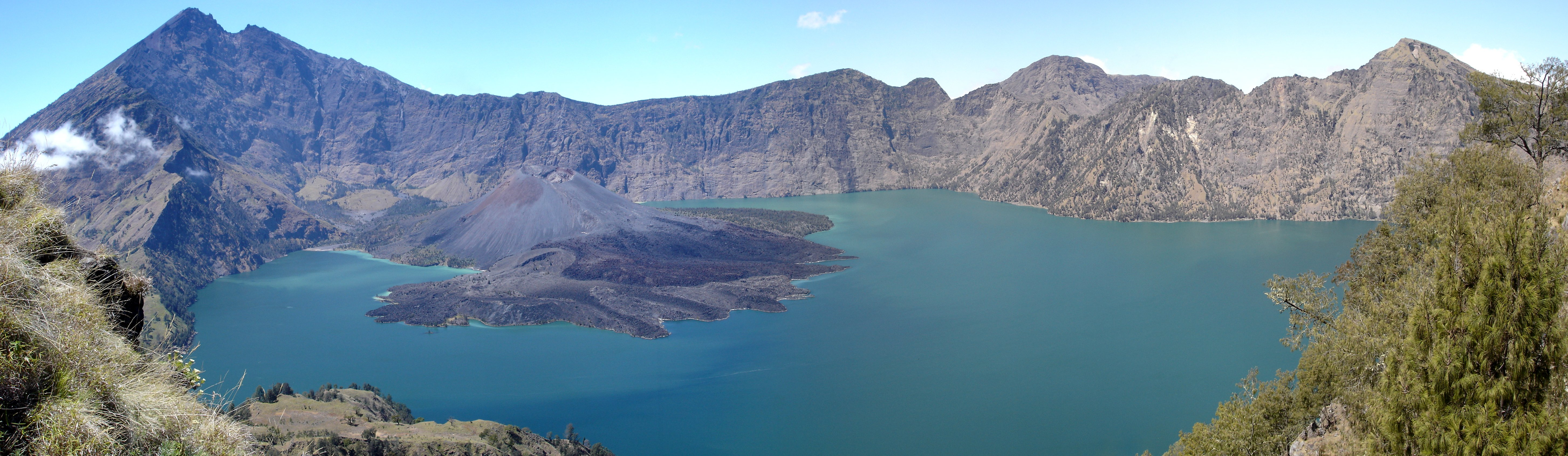 Blick vom nordwestlichen Calderarand auf den Gipfel des Gunung Rinjani (3726m), den kleineren Gunung Baru (2351m) und den See Danau Segara Anak.